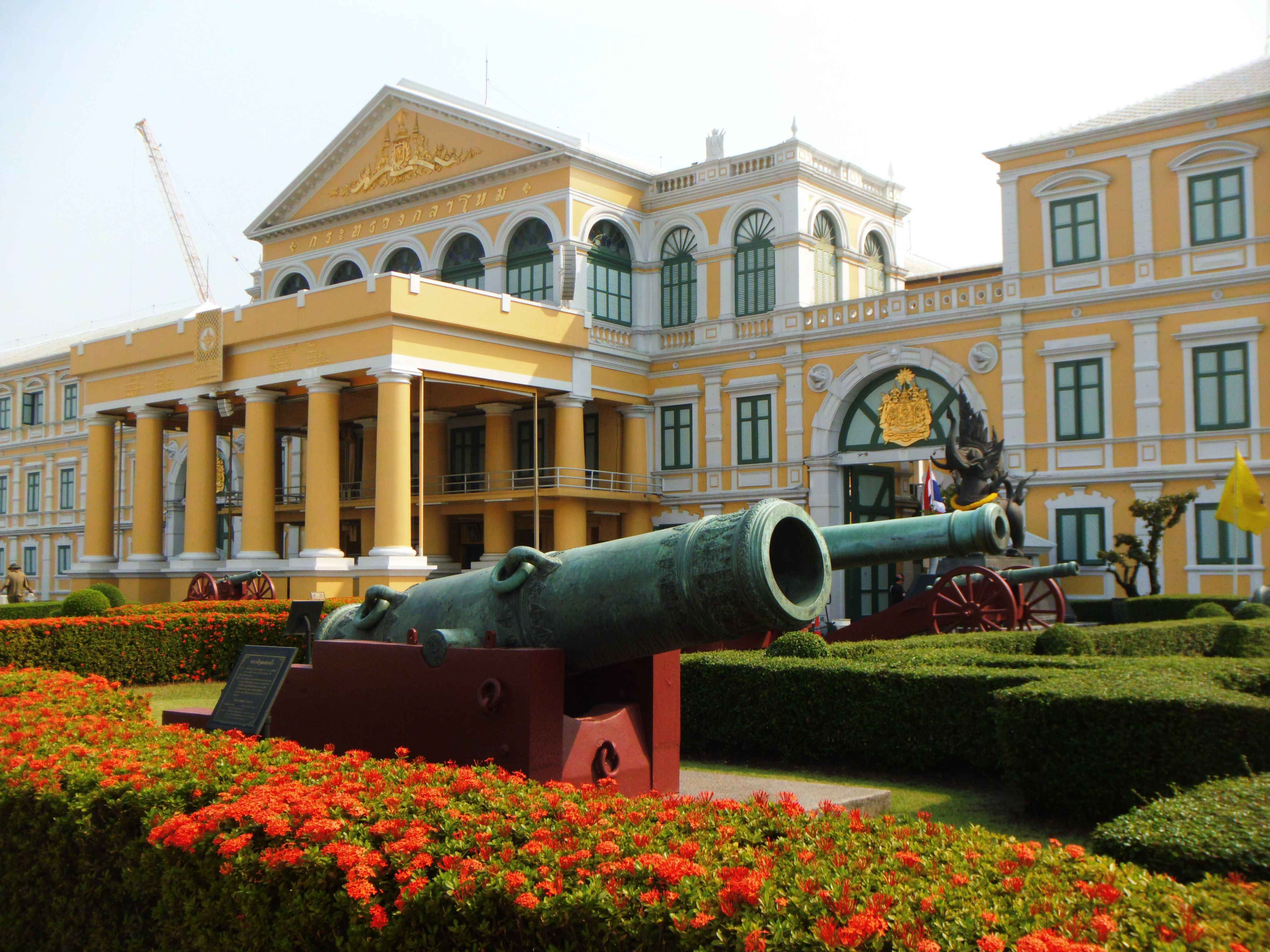 อาคารกระทรวงกลาโหม